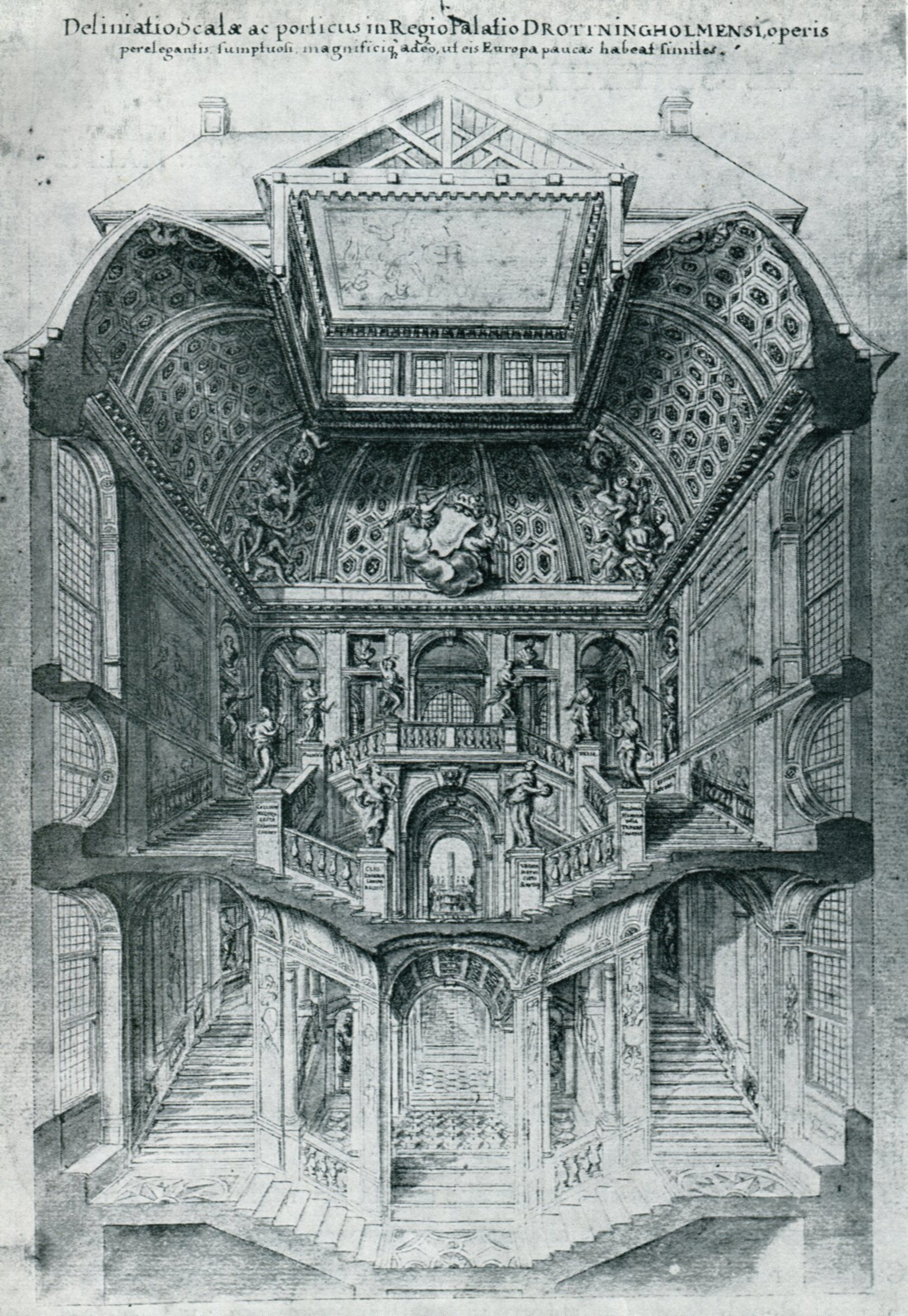 Sektion genom huvudtrappan på Drottningholms slott, gravyr av W. Swidde. Förlaga till band 1:82 i Suecia Antiqua et Hodierna.